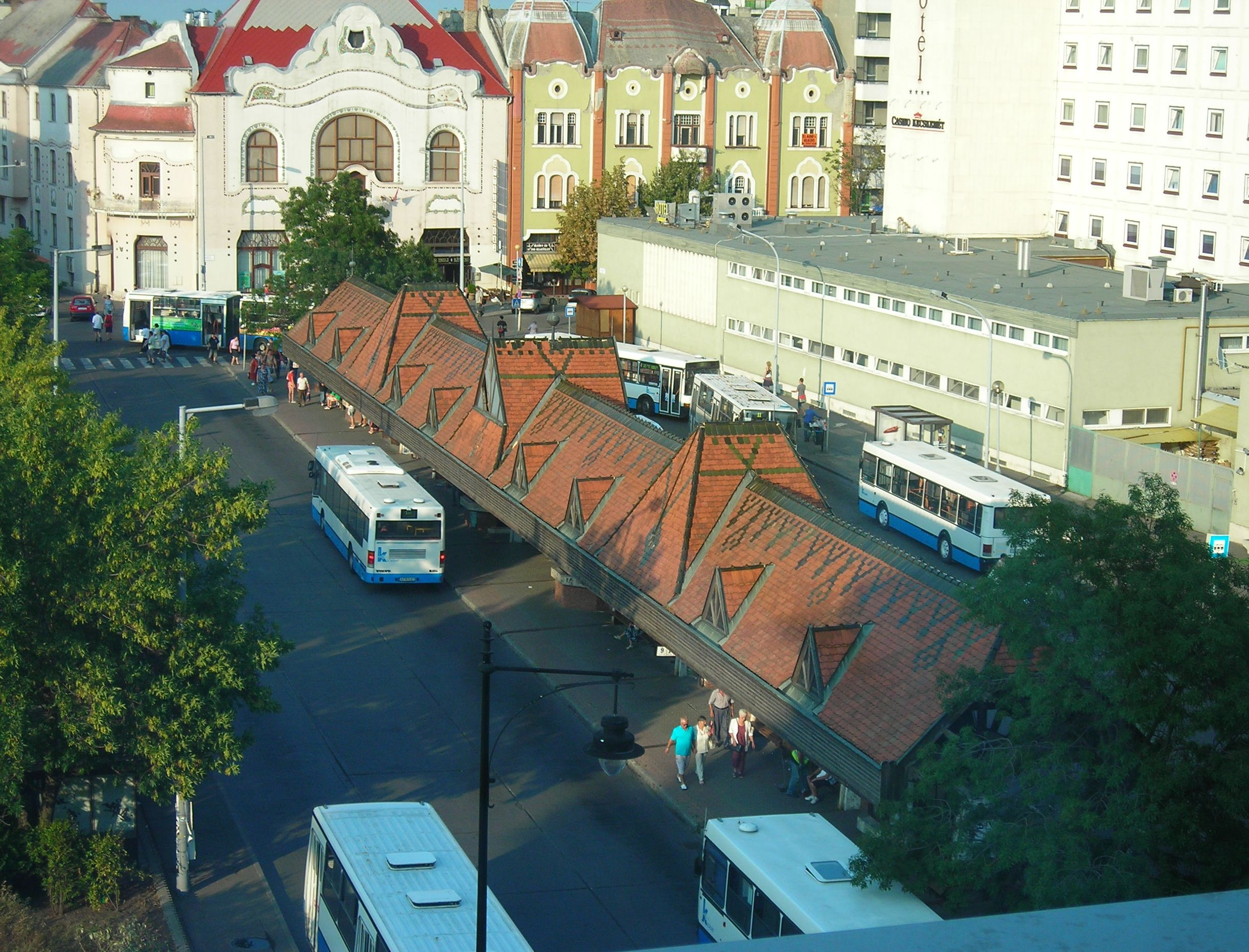 Kecskeméti helyi buszállomás a Malom Center épületéből